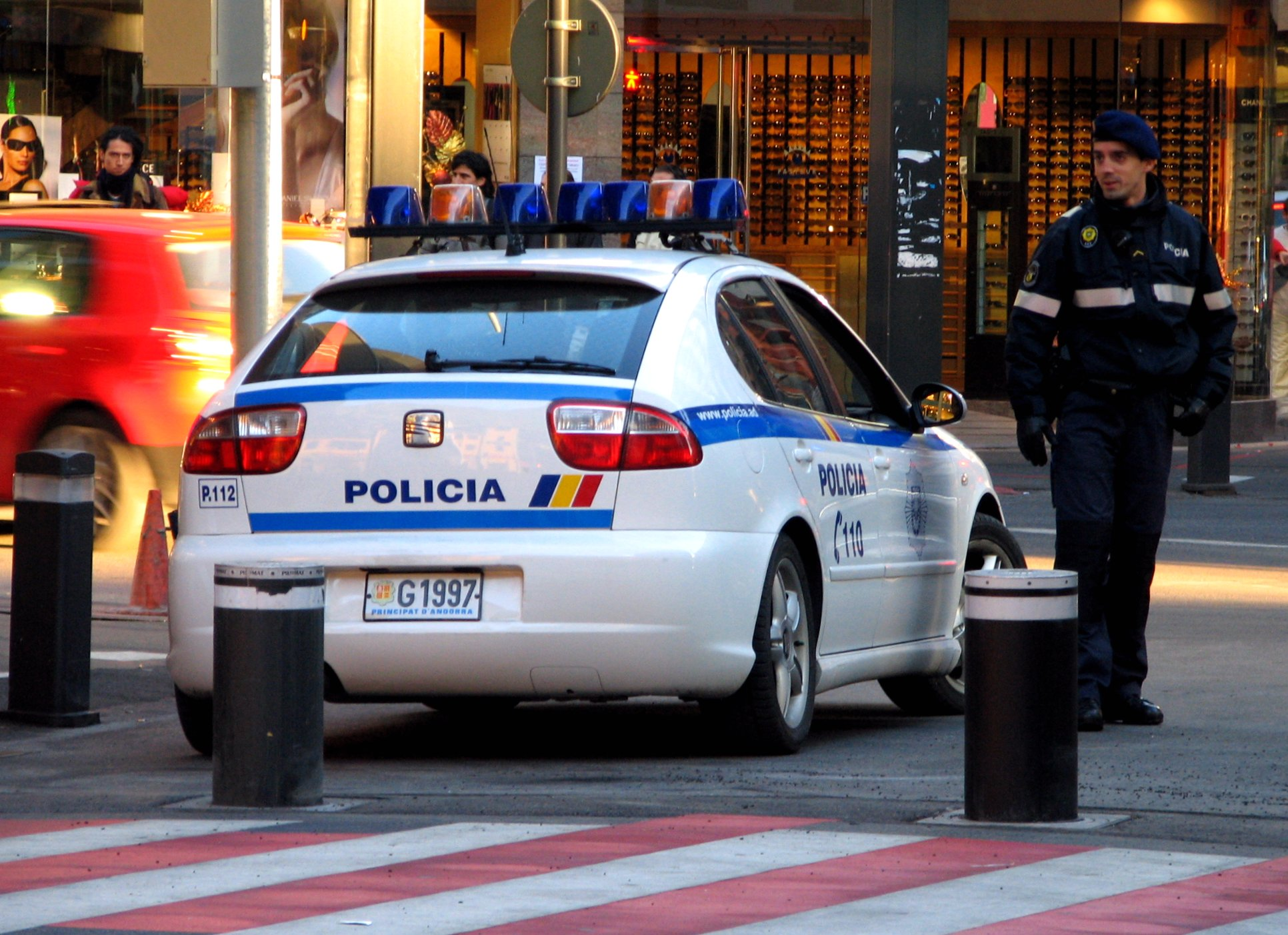 Cos de Policia Seat Leon Mk1.